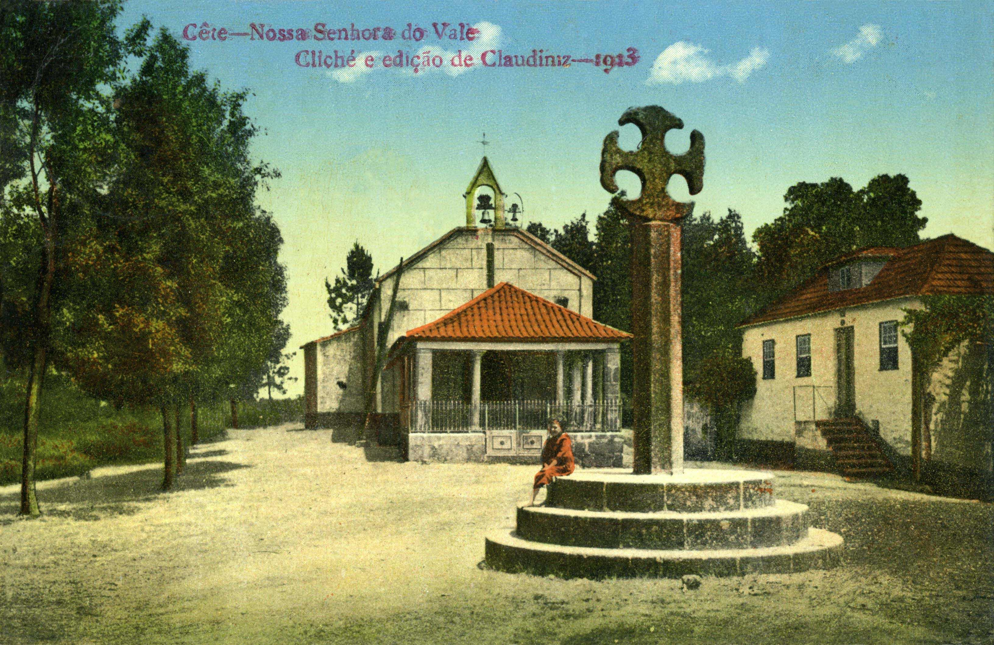 chapelle de notre Dame du Val, Cete, Paredes, Porto, Portugal. Carte postale de 1913